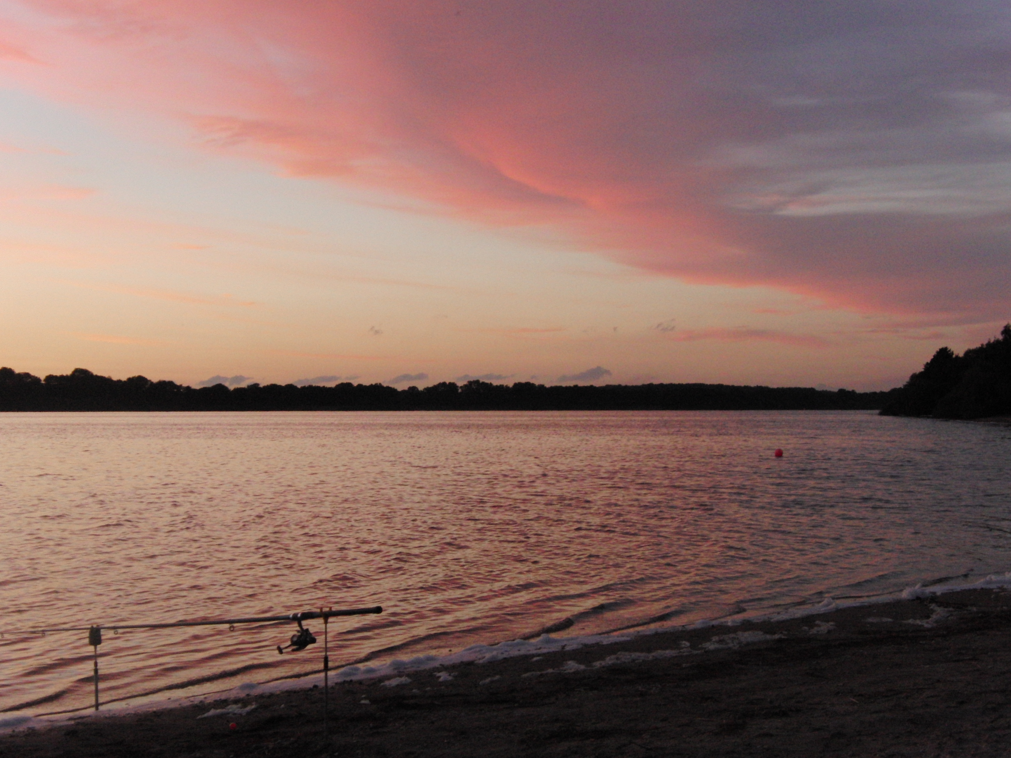 Nachtbild des Einfelder Sees bei Neumünster-Einfeld